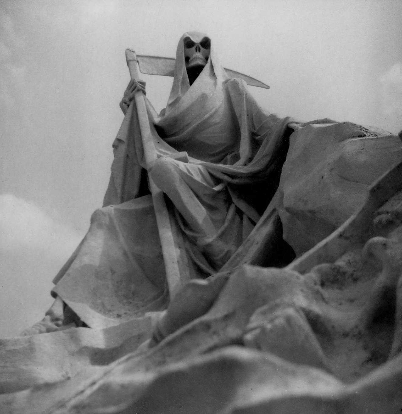 Sépulture cathelineau, cimetière de la charteuse Bordeaux Kirtap Photographie